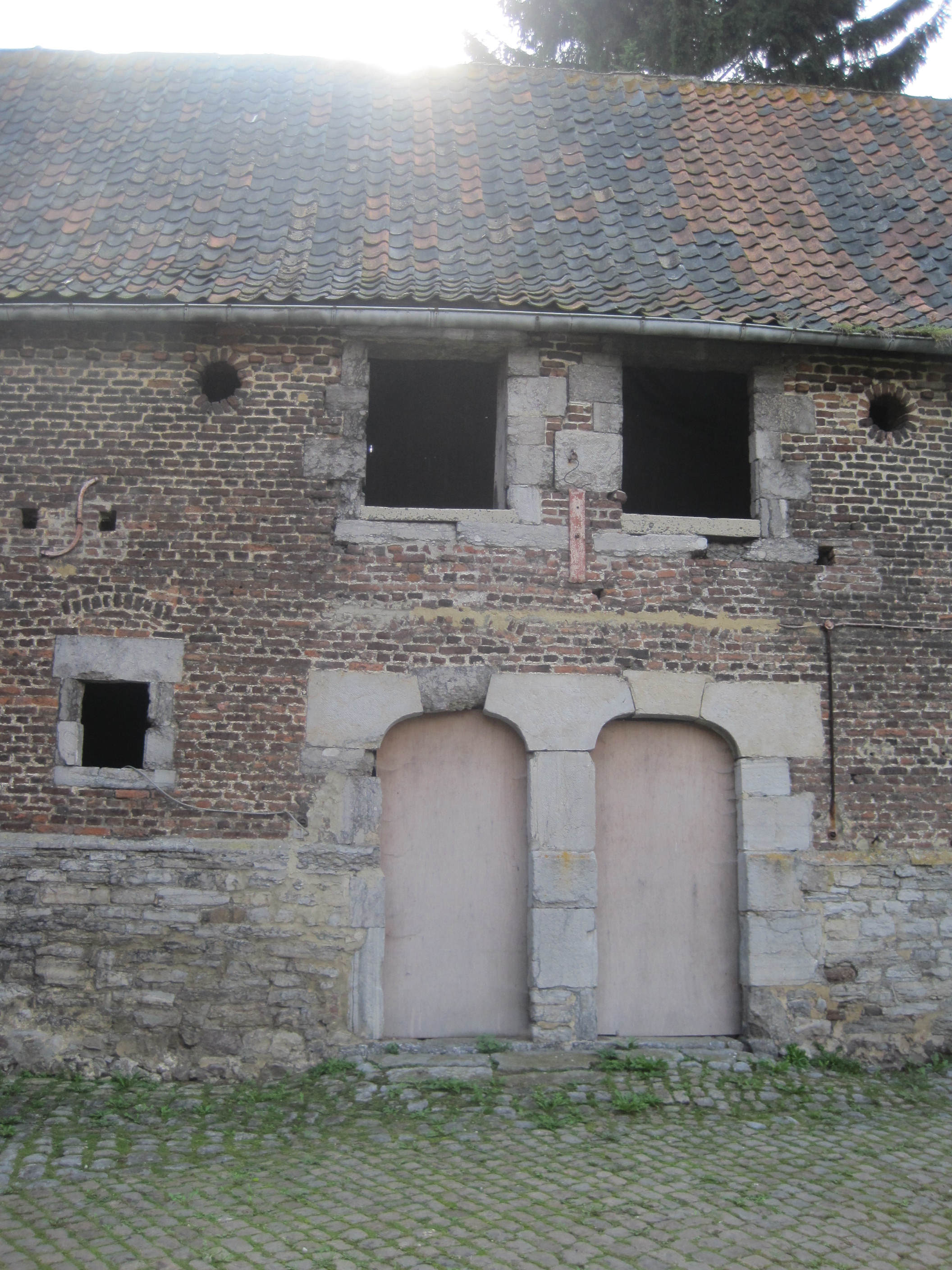 Ferme de la Grosse Tour